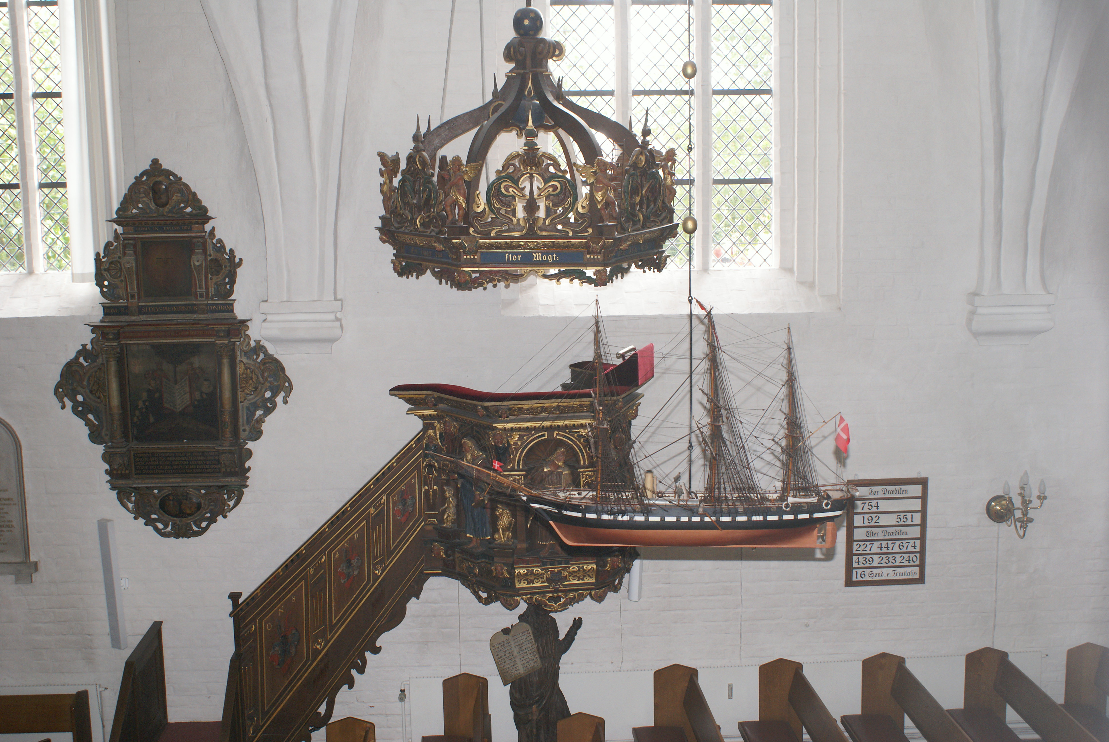 Klosterkirken (Nykøbing Falster), Prædikestol